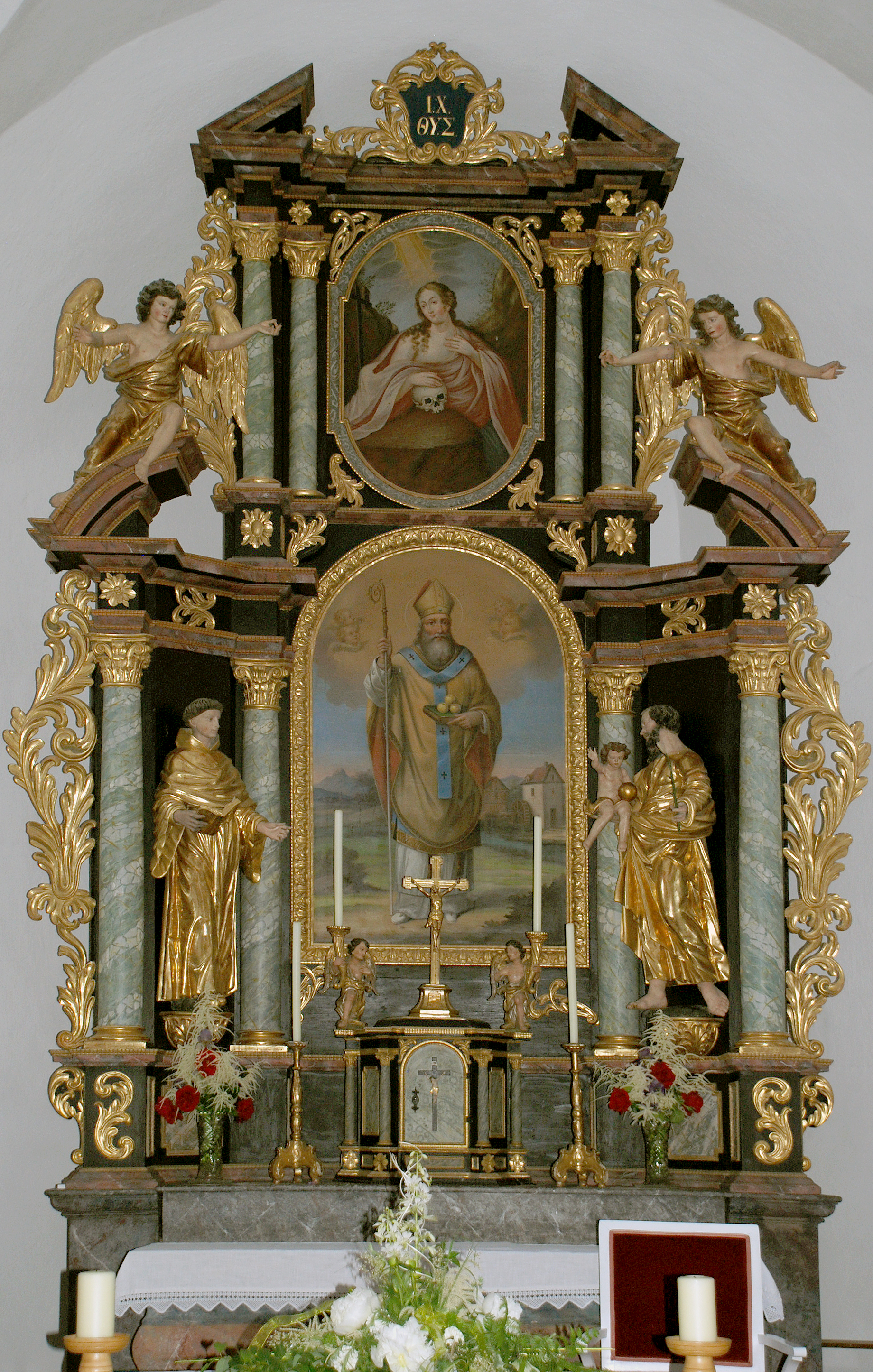 Trahütten, Steiermark, Österreich: Pfarrkirche Hochaltar